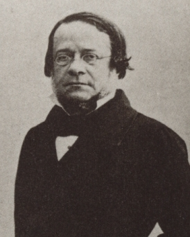 Daniele Manin (1804-1854) qui dirige la rébellion contre l'occupant autrichien